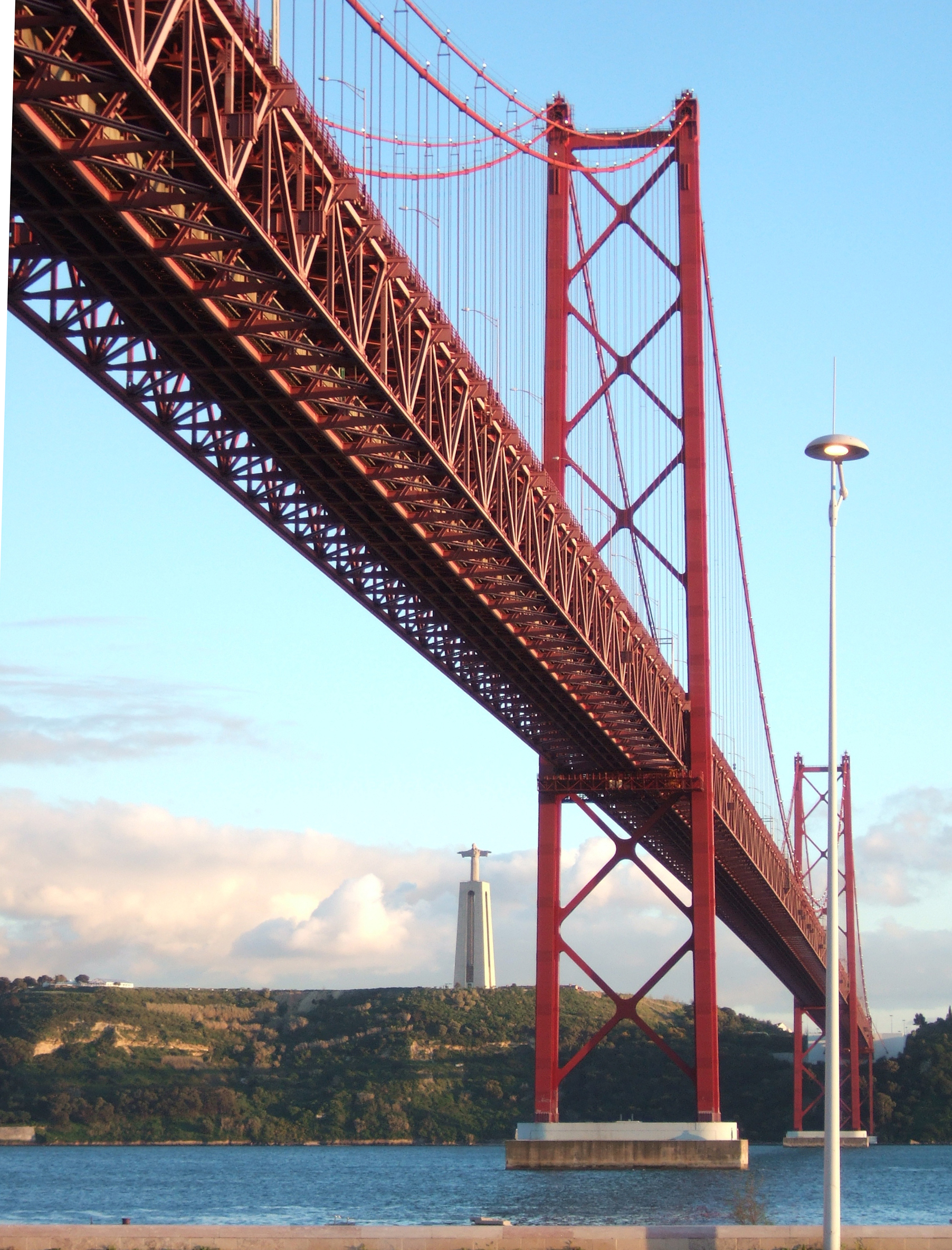 Ponte 25 de Abril Lisboa